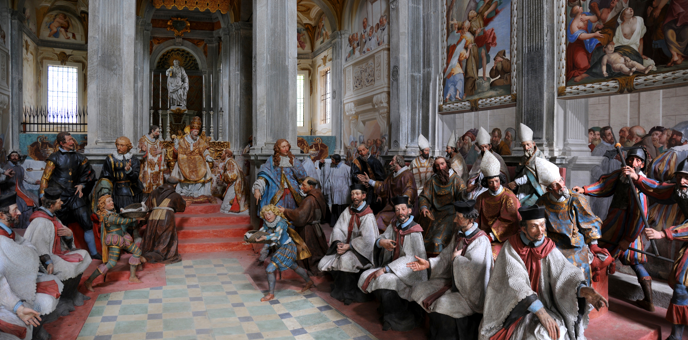 Cappelle Sacro Monte This is a photo of a monument which is part of cultural heritage of Italy.